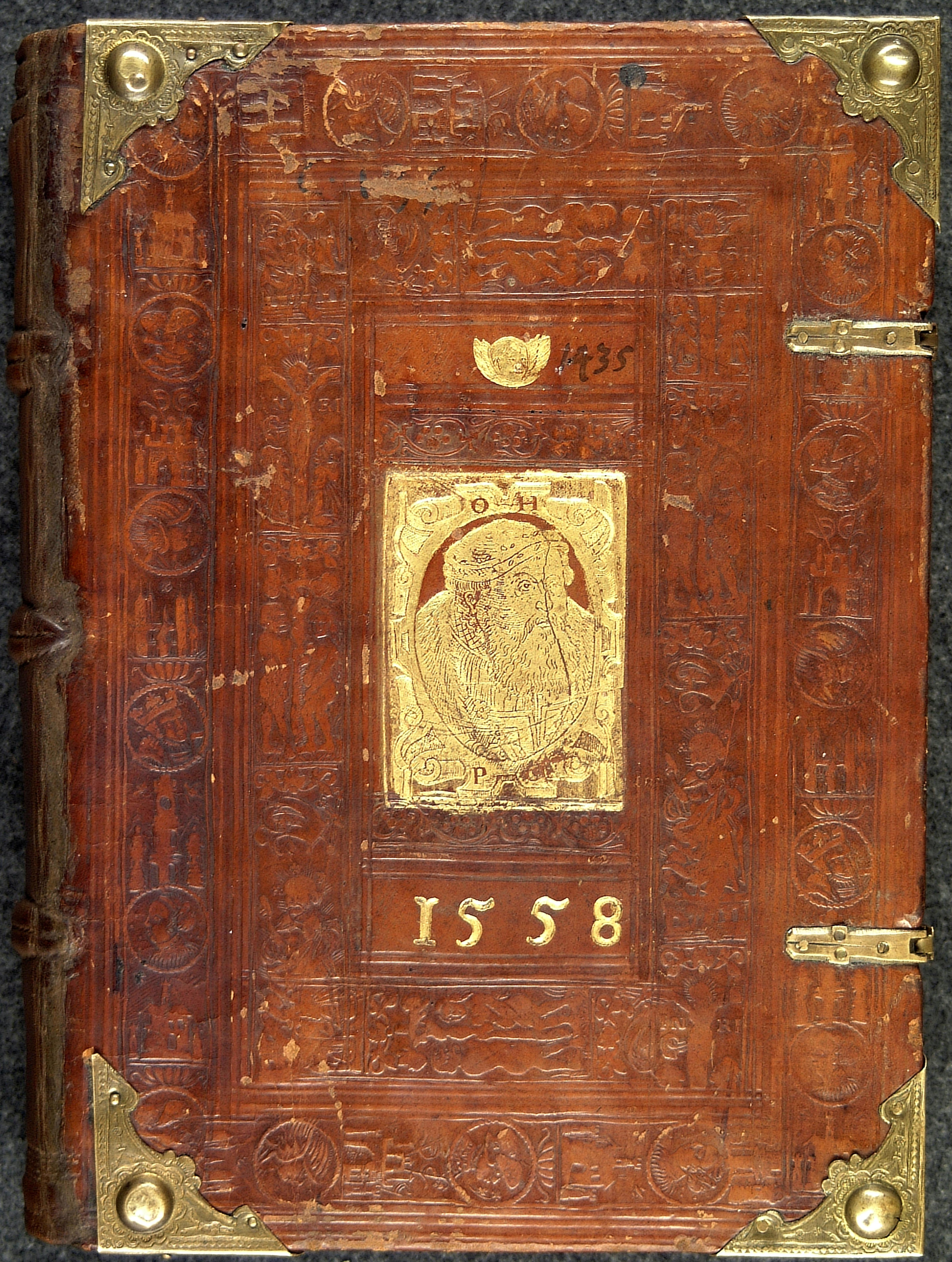 Codex Palatinus germanicus 67, Einband ("Ottheinrich-Einband"), Vorderdeckel: vergoldete Platte mit Bildnis Ottheinrichs, des Pfalzgrafen bei Rhein. Inschrift oben: O. H. (Ottheinrich); Inschrift unten: P. C. (Pfalzgraf, Churfürst); oberhalb: vergoldeter Engelskopf; unterhalb: Jahreszahl 1558